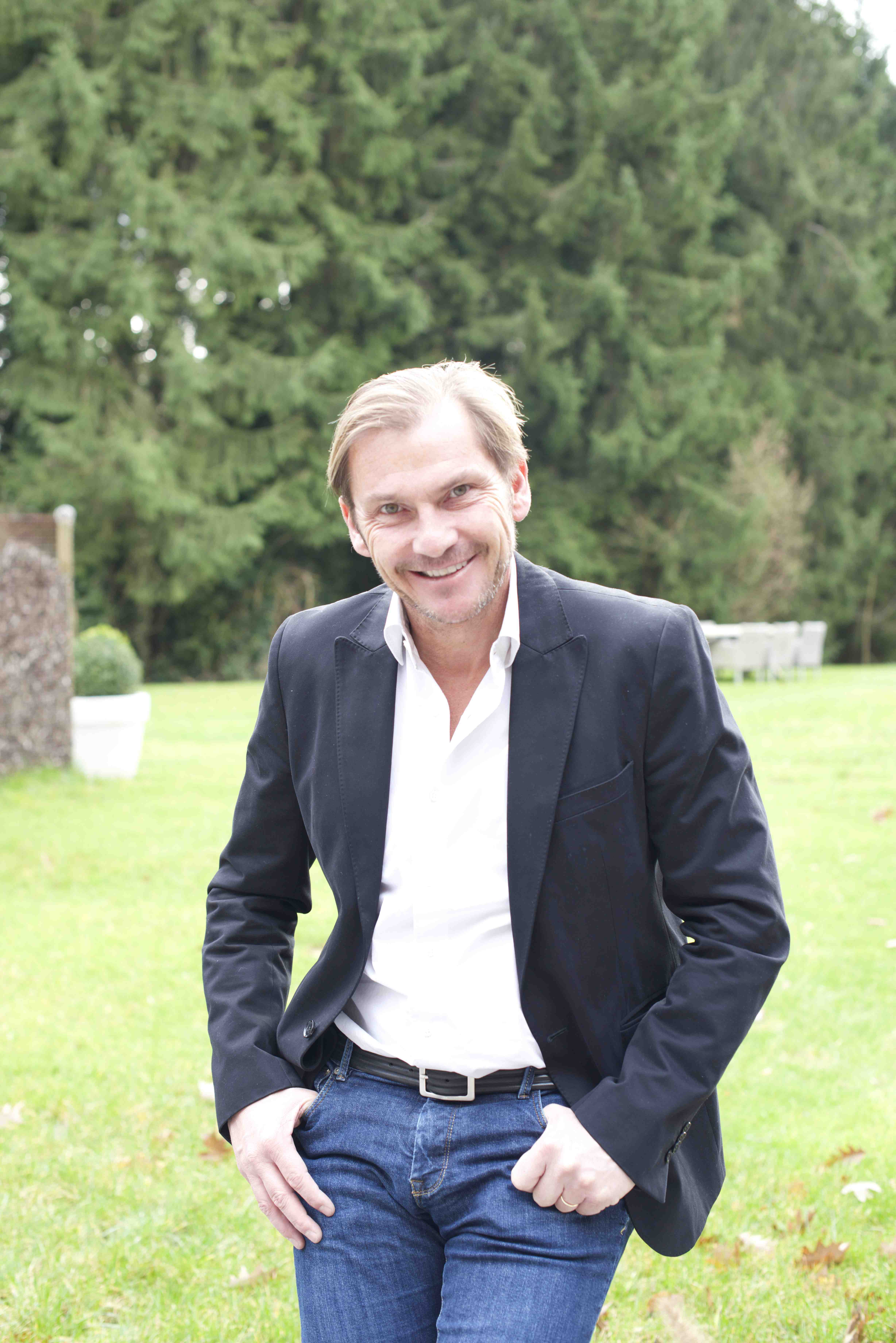 Portrait de Didier de Radiguès